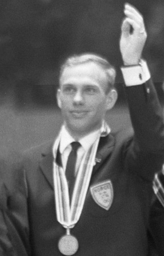 Ivar Eriksen